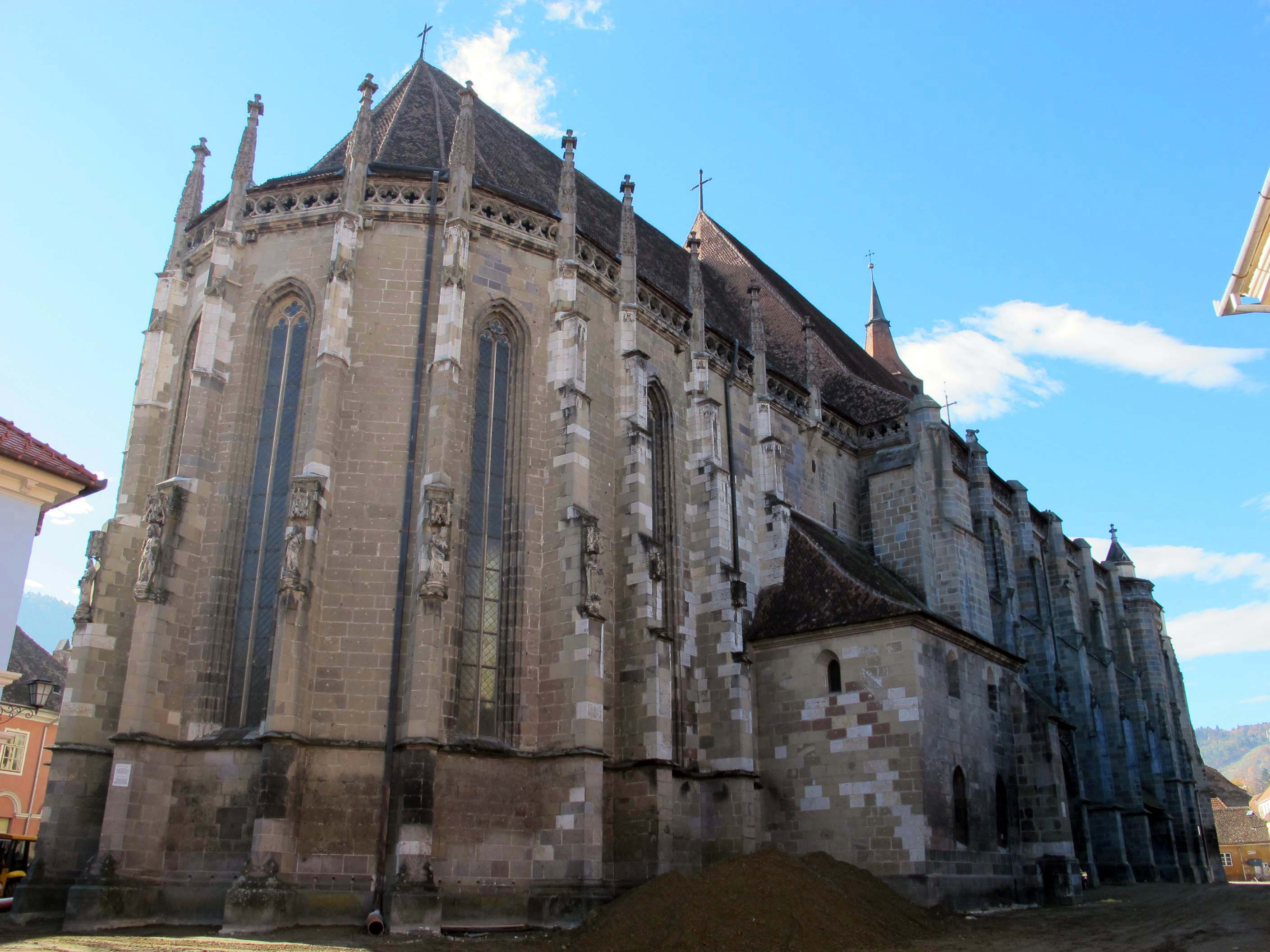 Brasov, chiesa nera